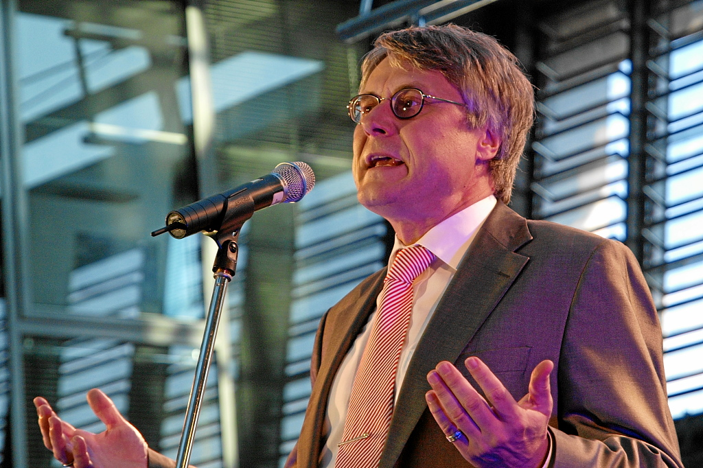 Hartmut Gaßner Portrait